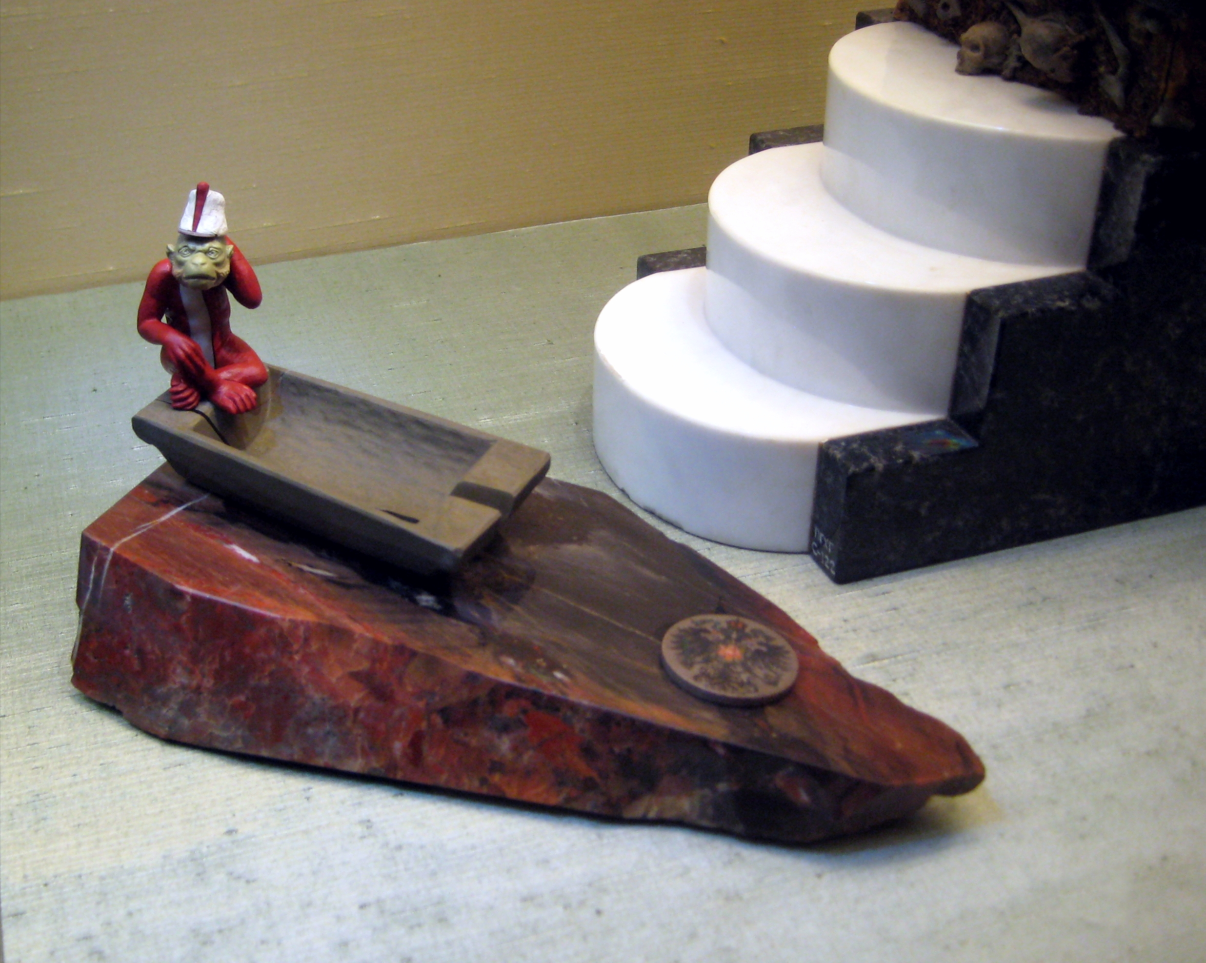 Аллегория Австро-Венгрии. Петроград, 1914-16. Фирма А. Денисова-Уральского. Красная, пестрая и фисташковая яшма, халцедон, водяно-прозрачный кварц, известняк, синтетический материал.